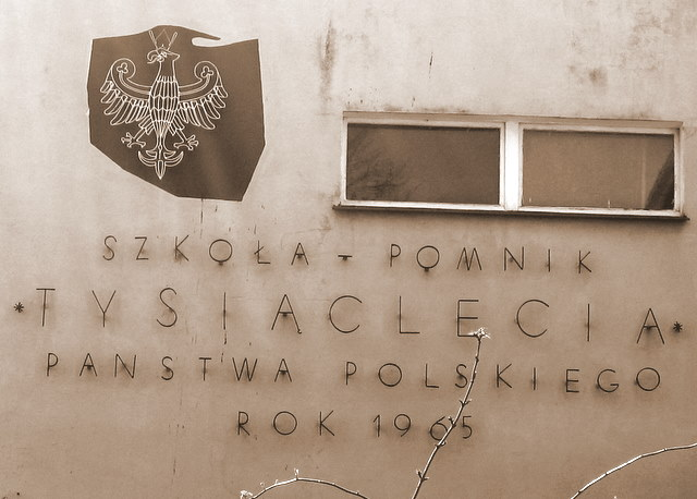 Napis na szkole Tysiąclecia upamiętniający budowę szkoły w planie 1000 szkół na Tysiąclecie Istnienia Państwa Polskiego